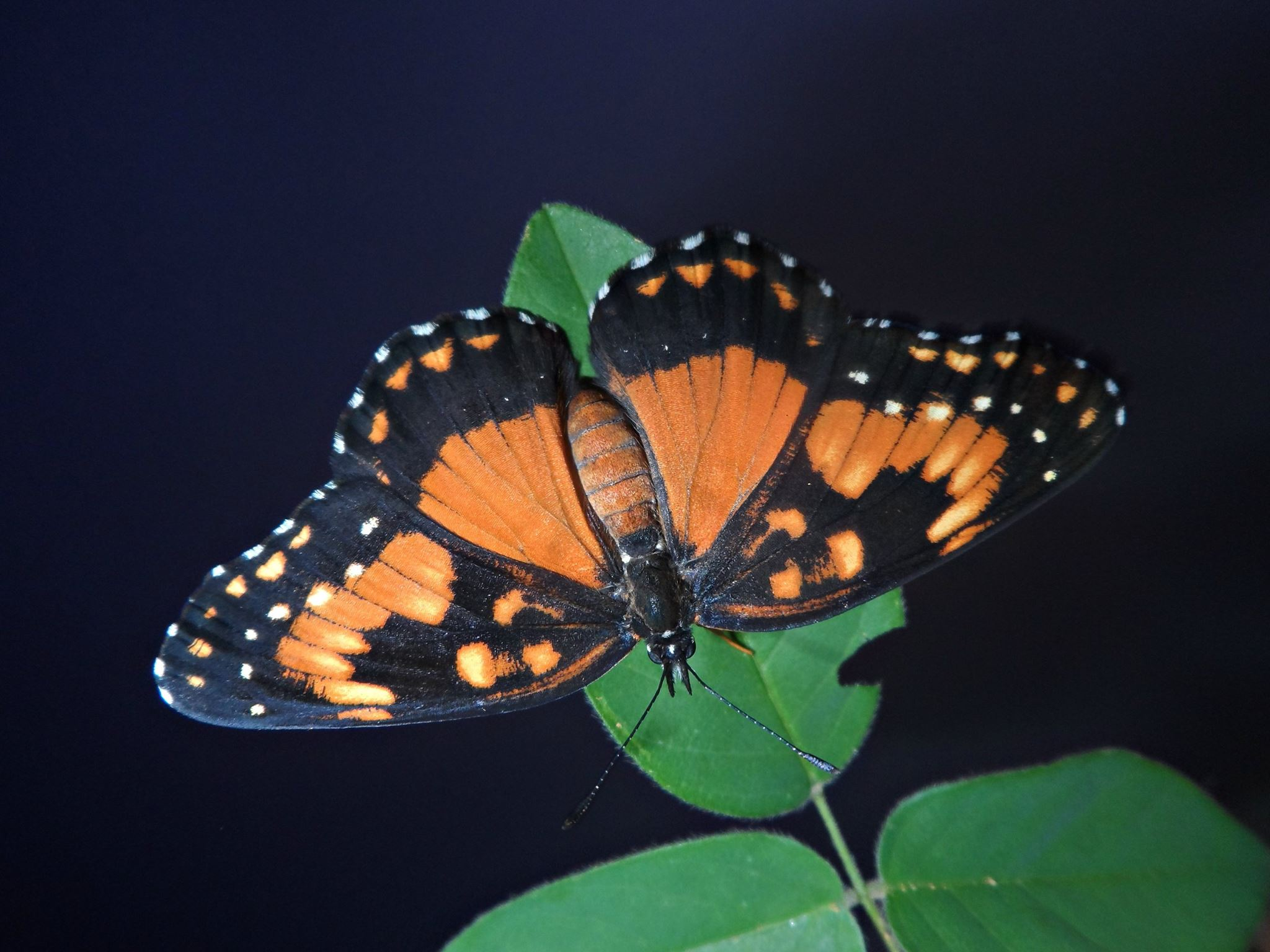 Chlosyne lacinia saundersii dorsal